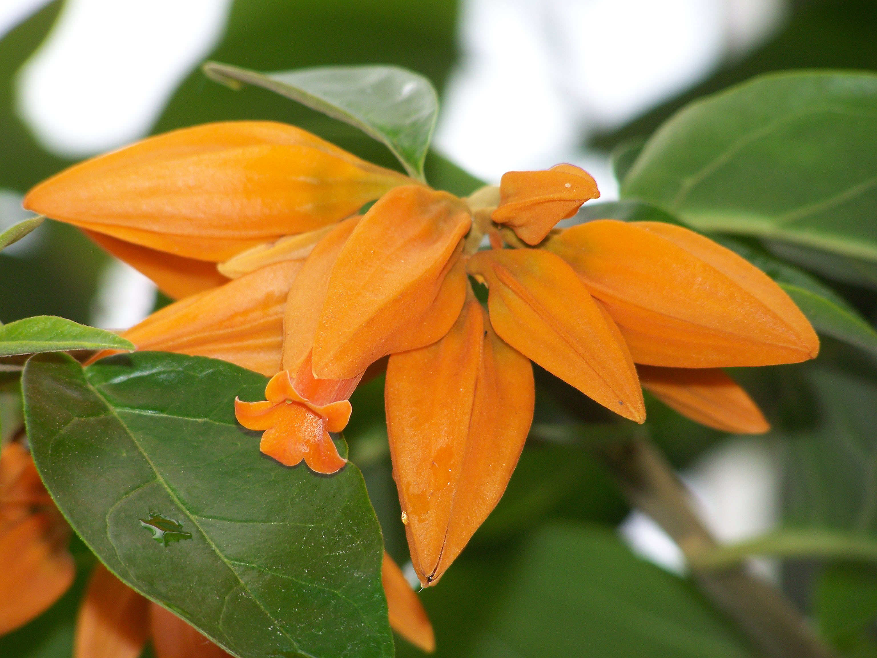 Orangerote Juanulloa (Juanulloa) mexicana, Botanischer Garten Berlin